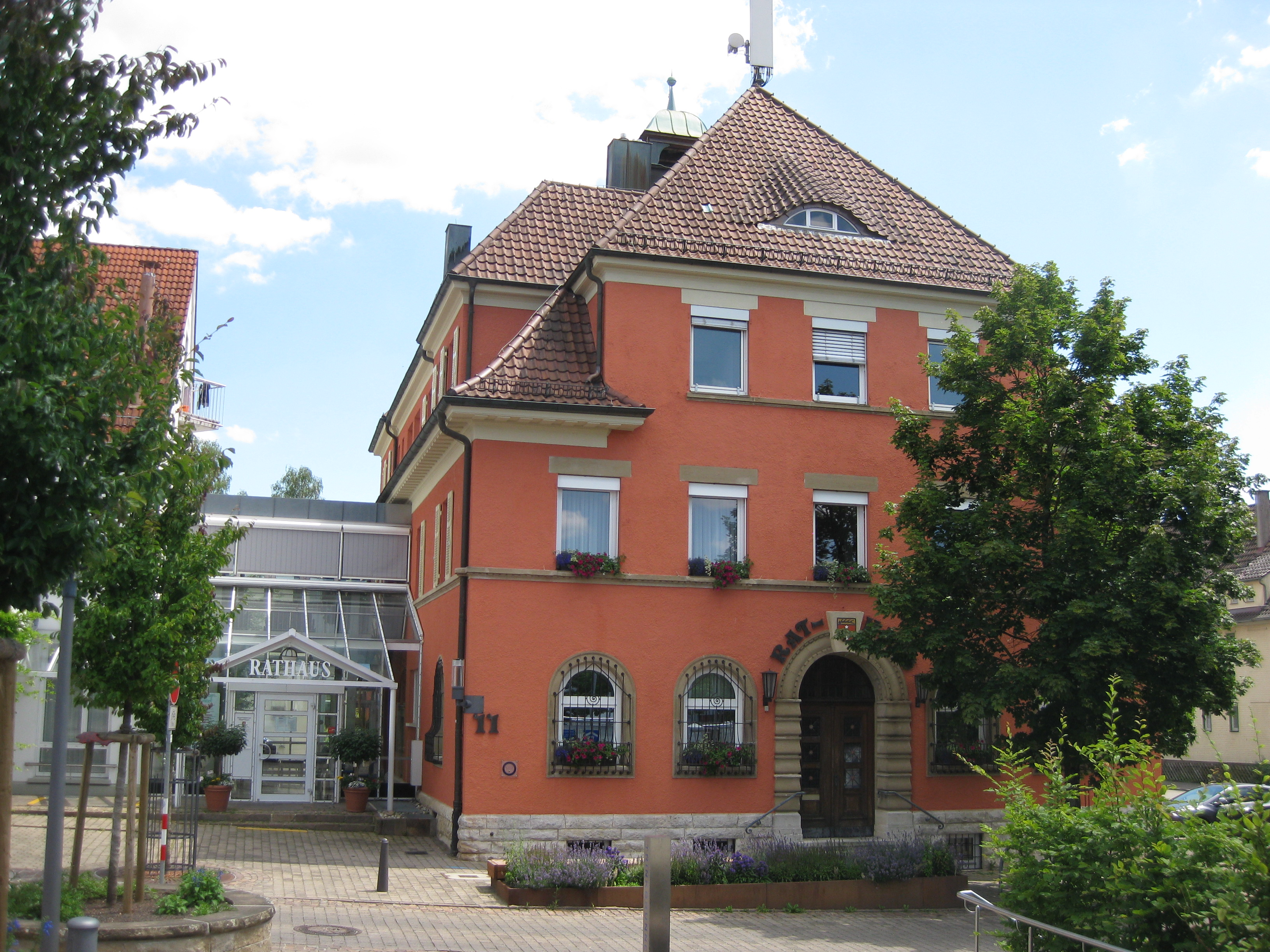 Rathaus in Plüderhausen im Jahr 2020